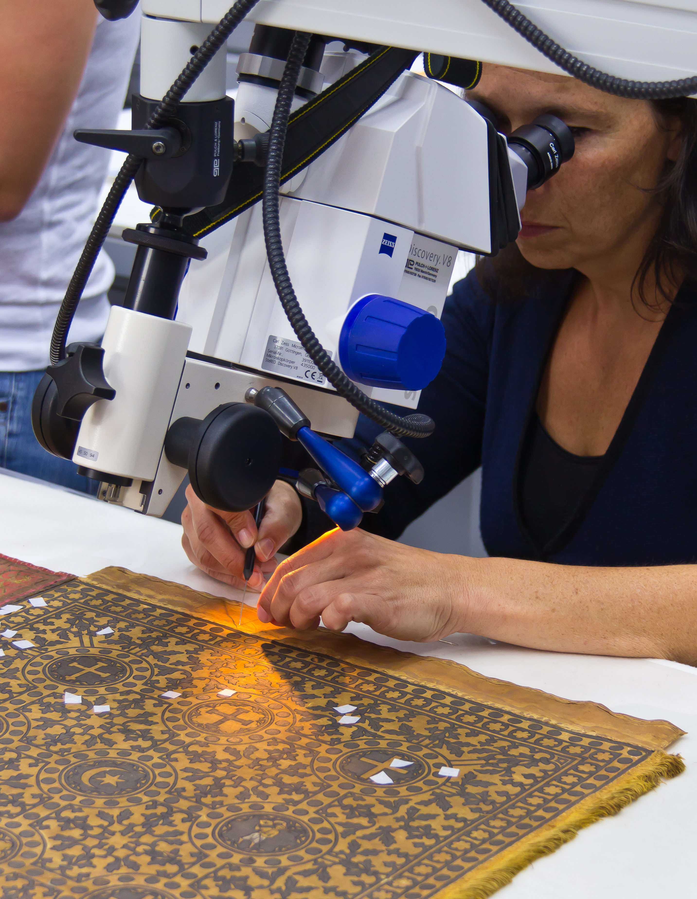 Das Dreikronenbanner (Kölner Stadtbanner) wird in der Werkstatt des Museum Schnütgen für die Ausstellung „Glanz und Größe des Mittelalters - Kölner Meisterwerke aus den großen Sammlungen der Welt“, 4. November 2011-26. Februar 2012, vorbereitet. Lose, gelockerte Textilfasern und der Farbauftrag werden konserviert und gefestigt. See above